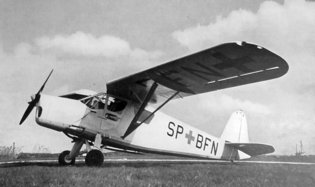 letecký motor Walter Major 6 a letoun RWD 13S (SP-BFN)